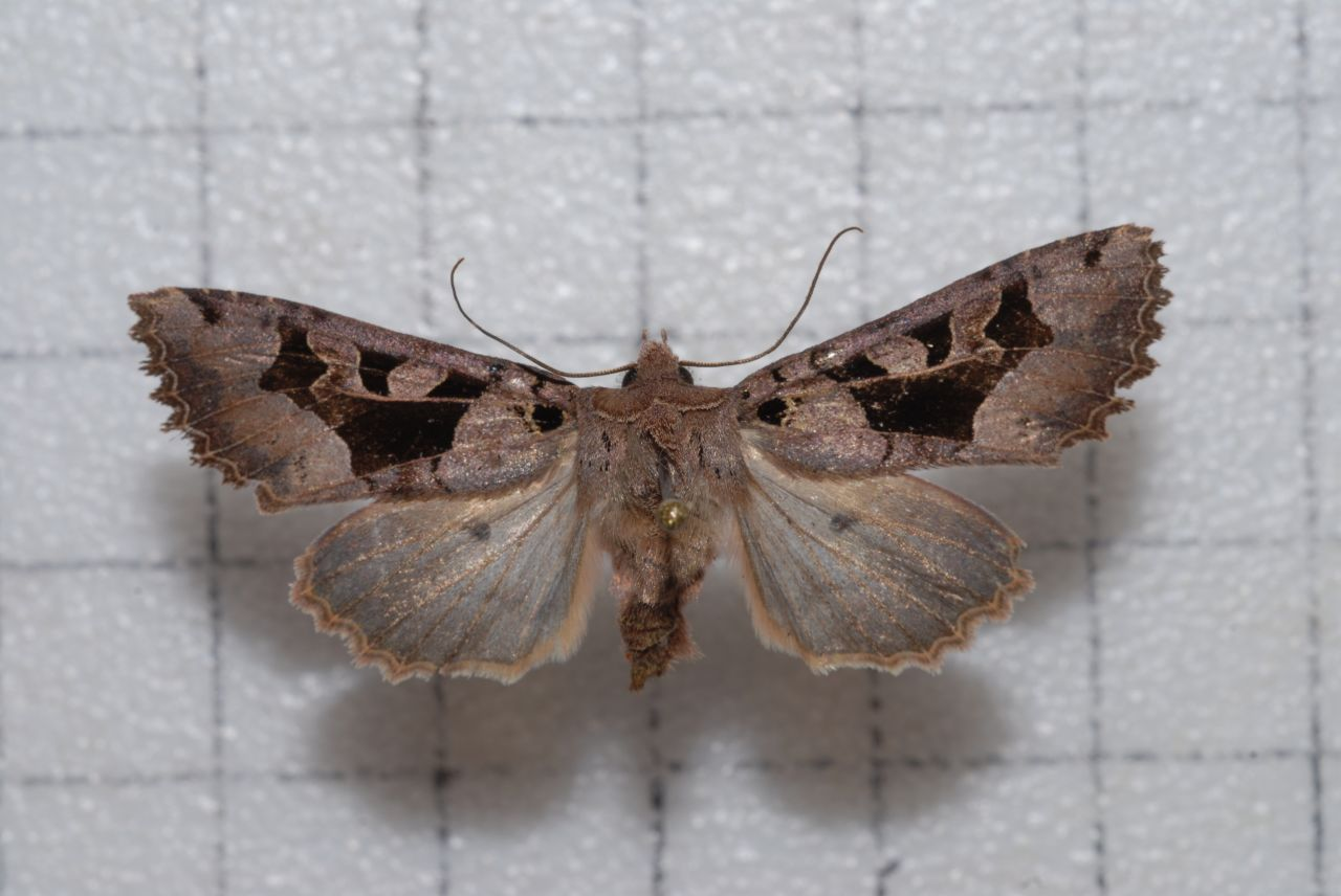 Clavipalpula aurariae (Oberthür, 1880) 金棒鬚夜蛾 鞍1:P.110,Pl.27-21